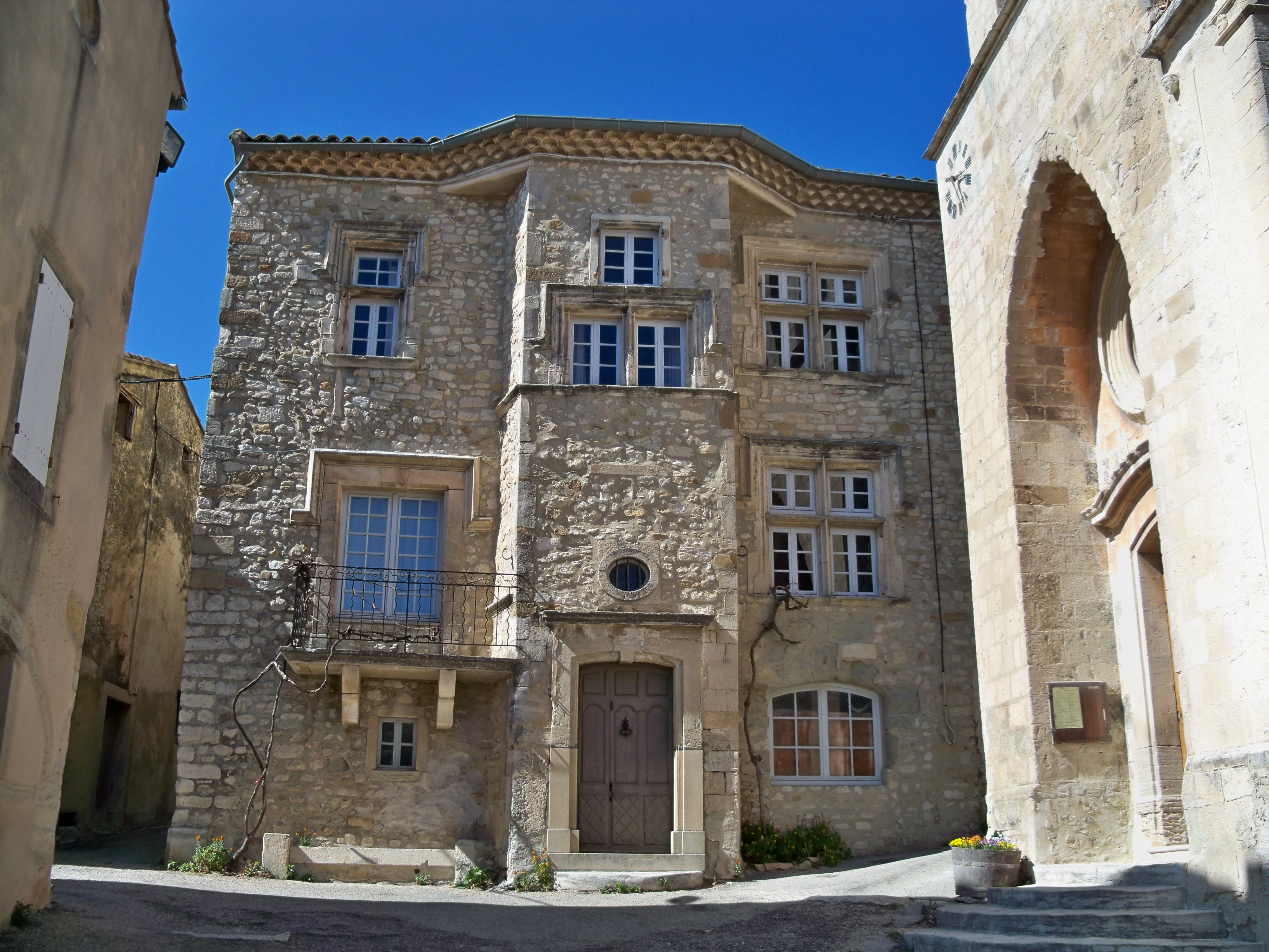 Prieuré Saint-Mayeul de Rousset les Vignes (26)